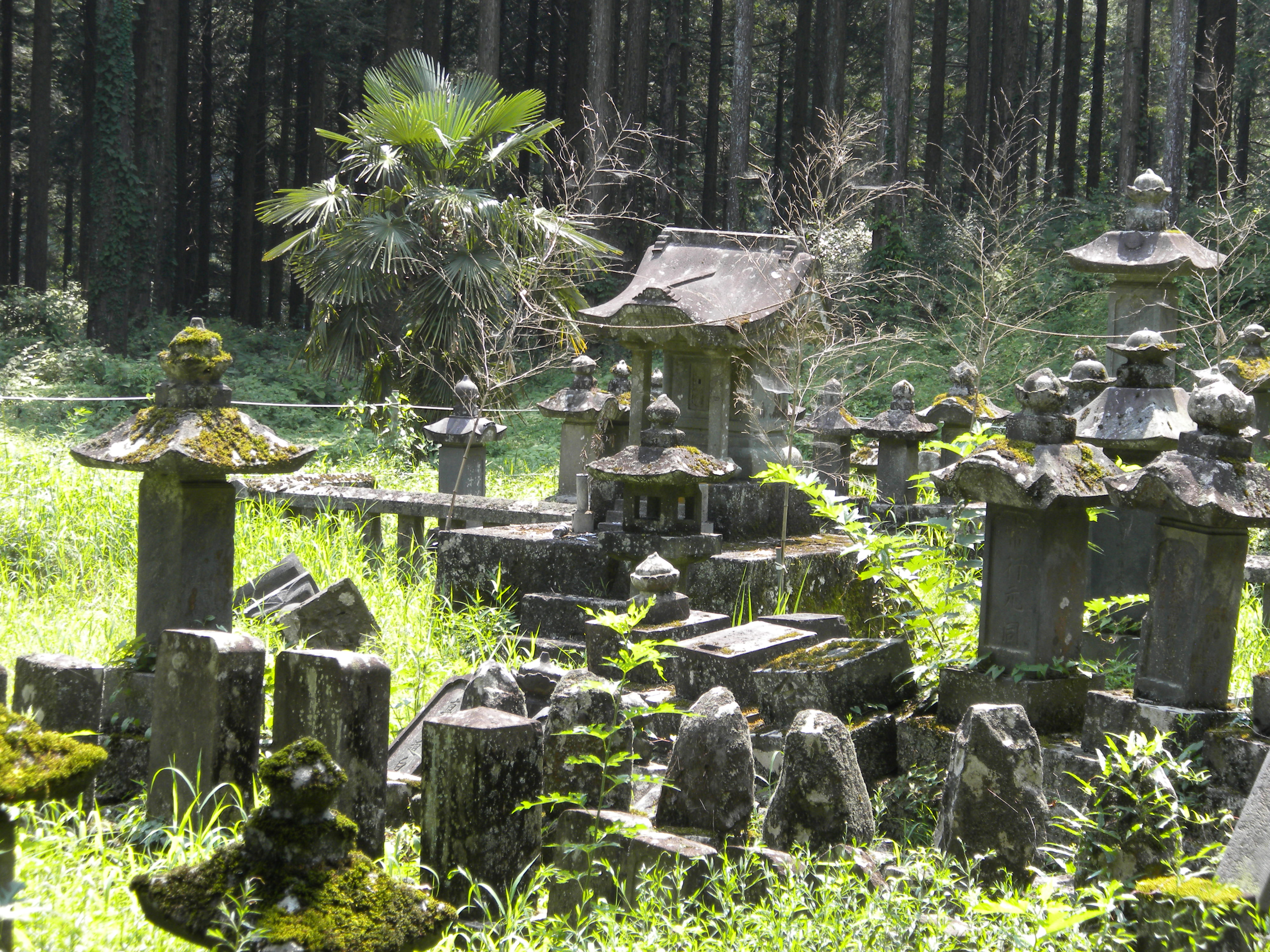 人穴富士講遺跡碑塔群